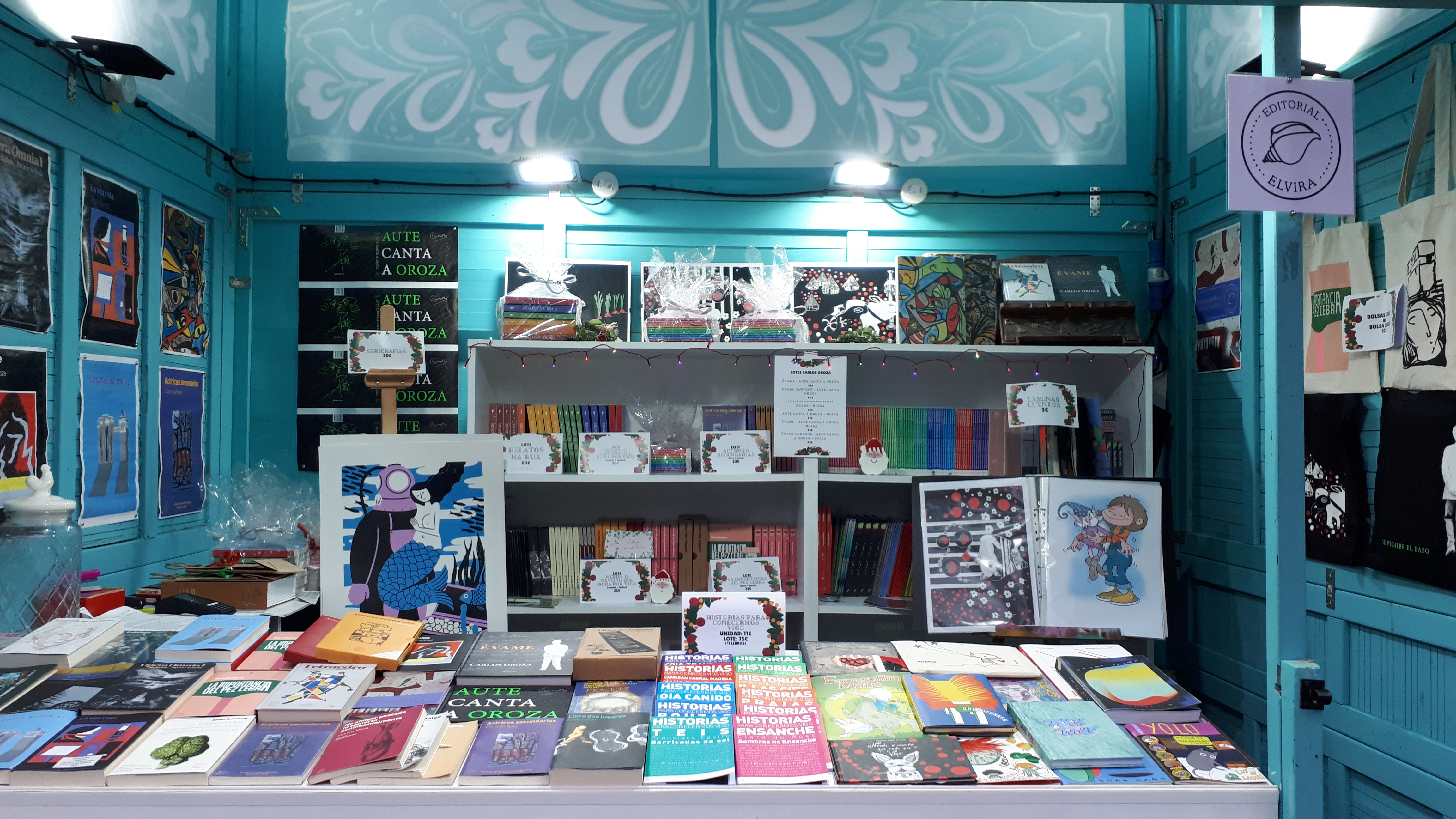 Caseta expositora de la Editorial Elvira 2019 (Cies Market) Vigo.